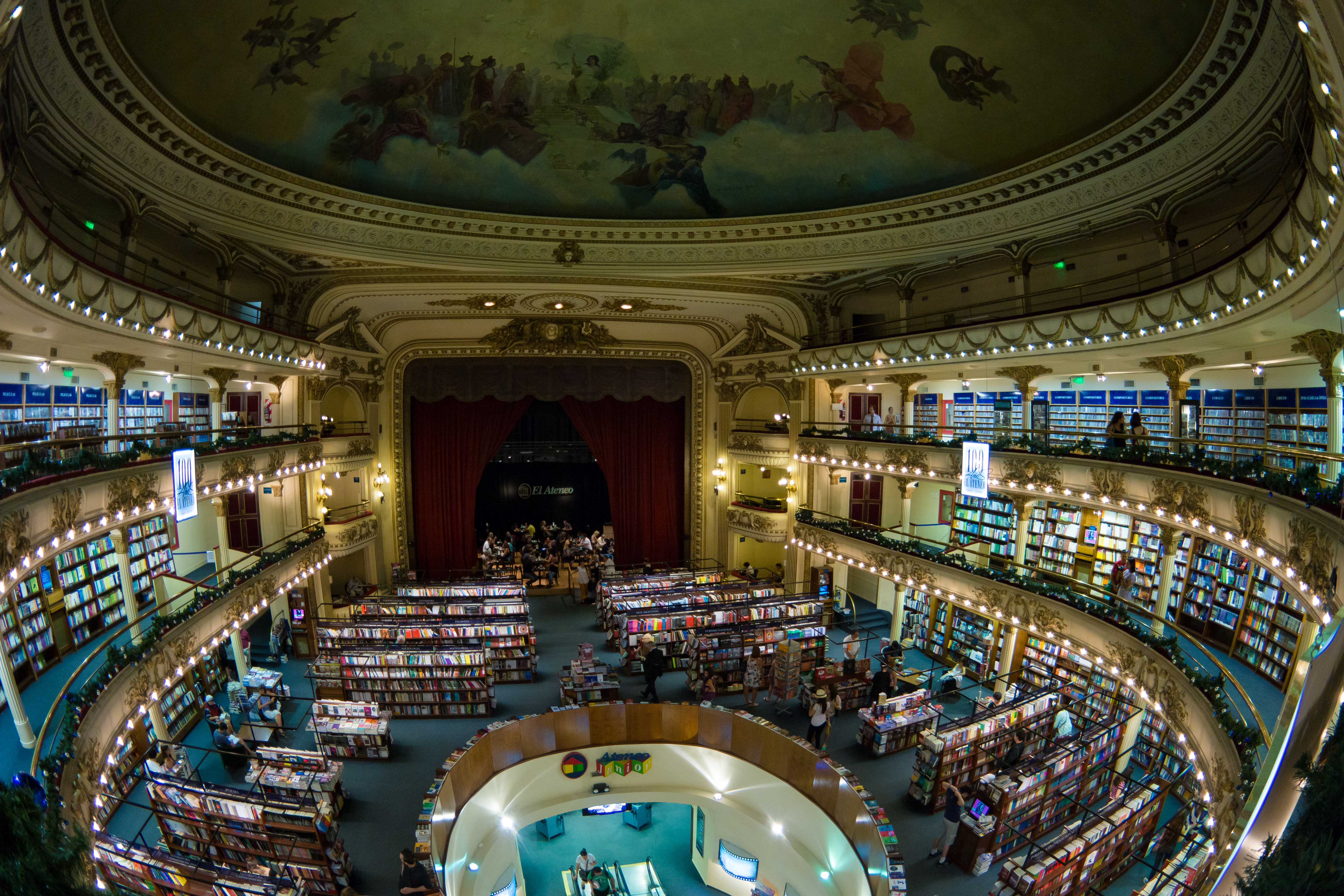 El Ateneo Book Store